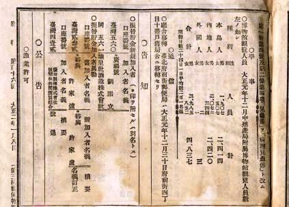 中文（台灣）: 大正元年十二月附屬於殖產局底下之博物館觀覽人數統計